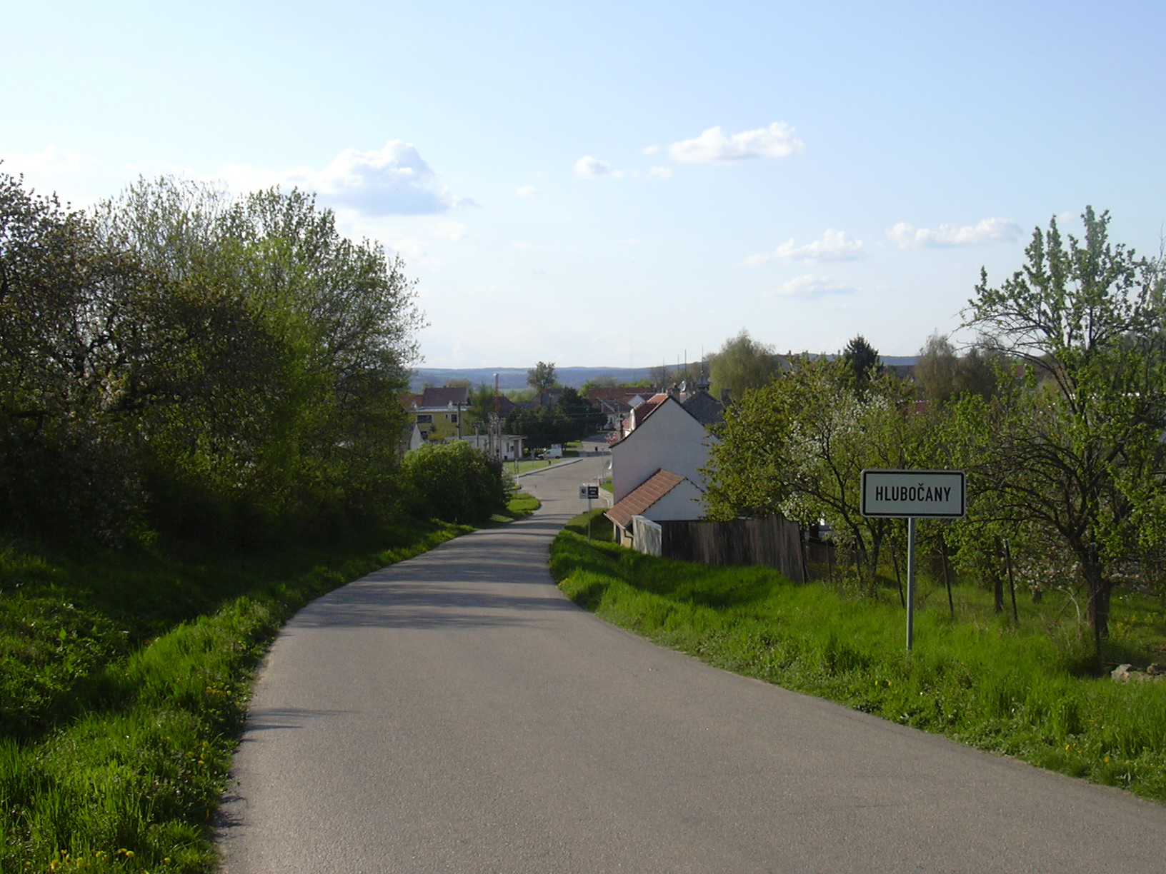 Hlubočany, příjezd ze směru Kučerov (Vyškov District - Czech Republic)